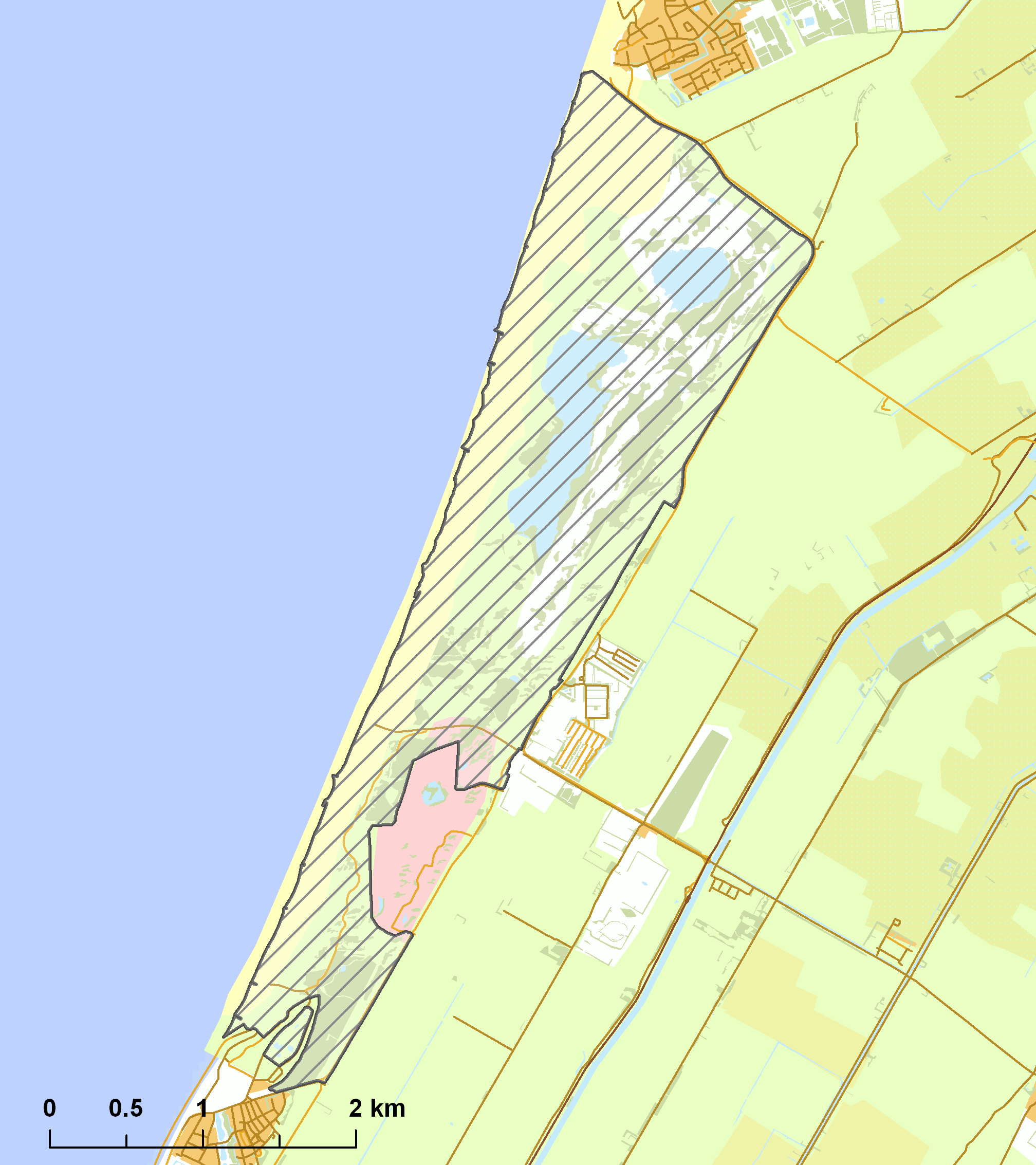 Natura2000 - Zwanenwater & Pettemerduinen.png